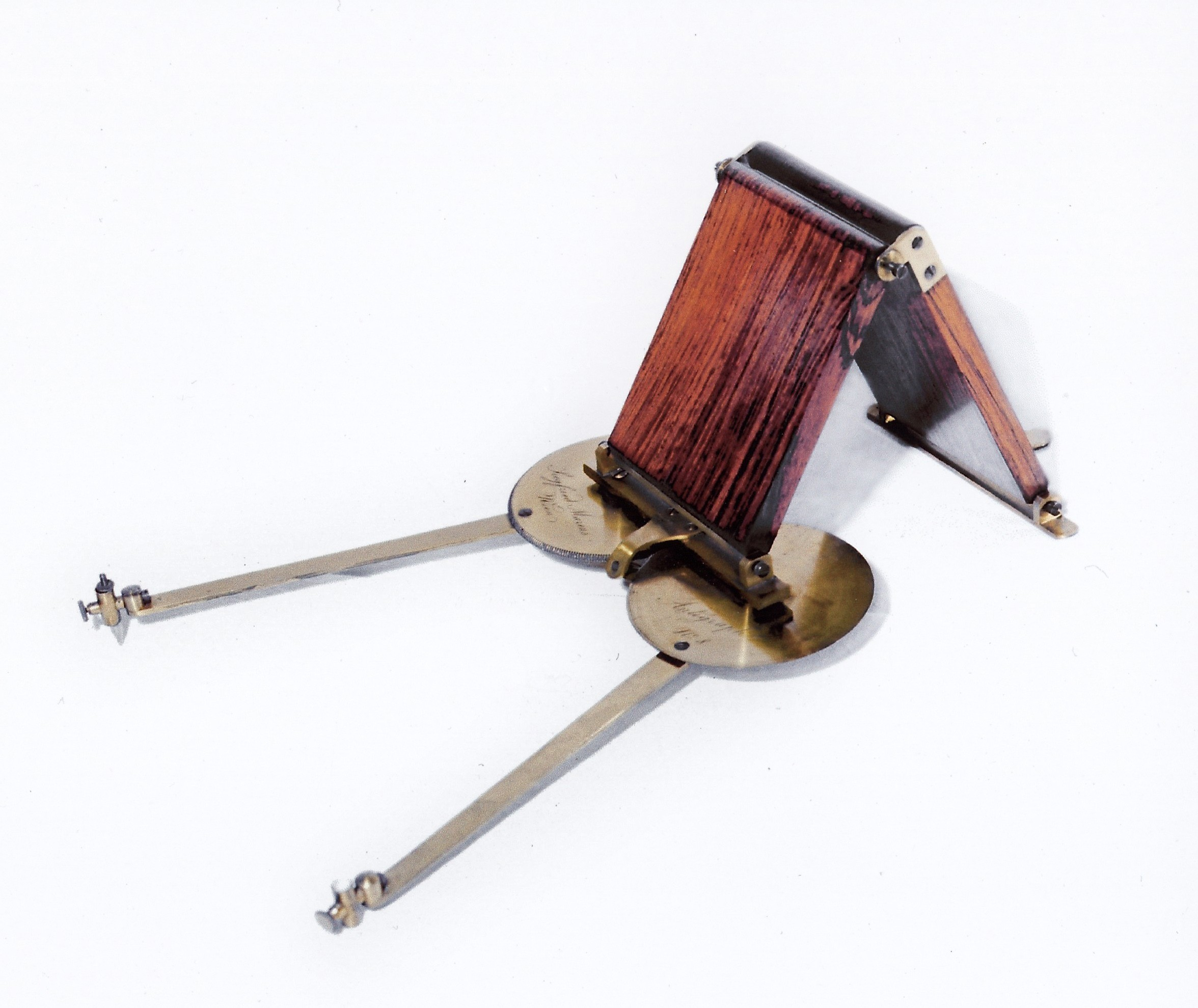 Antigraph, Gerät zum spiegelverkehrt zeichnen nach S. Marcus